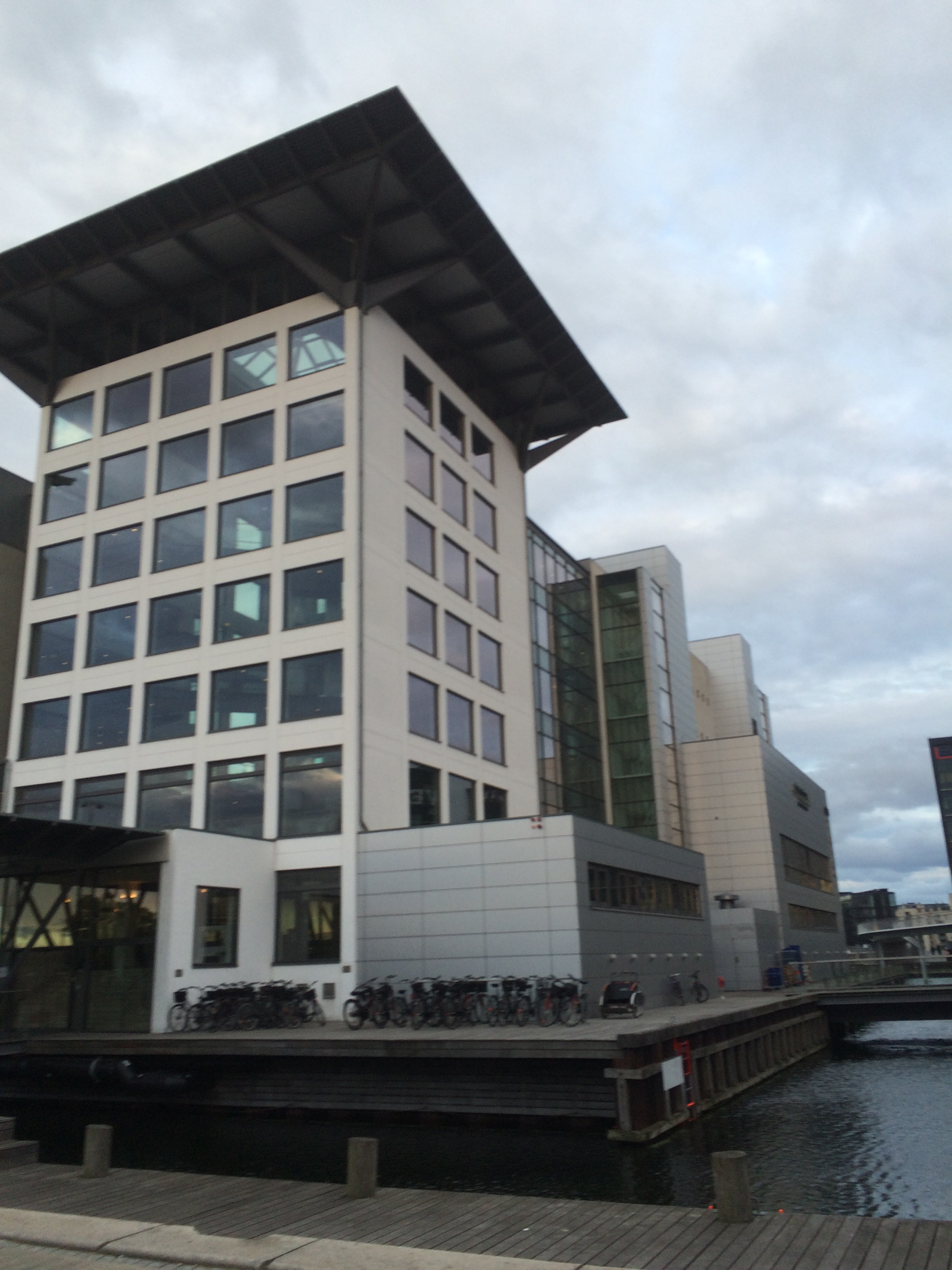 Hotell i Köpenhamn.